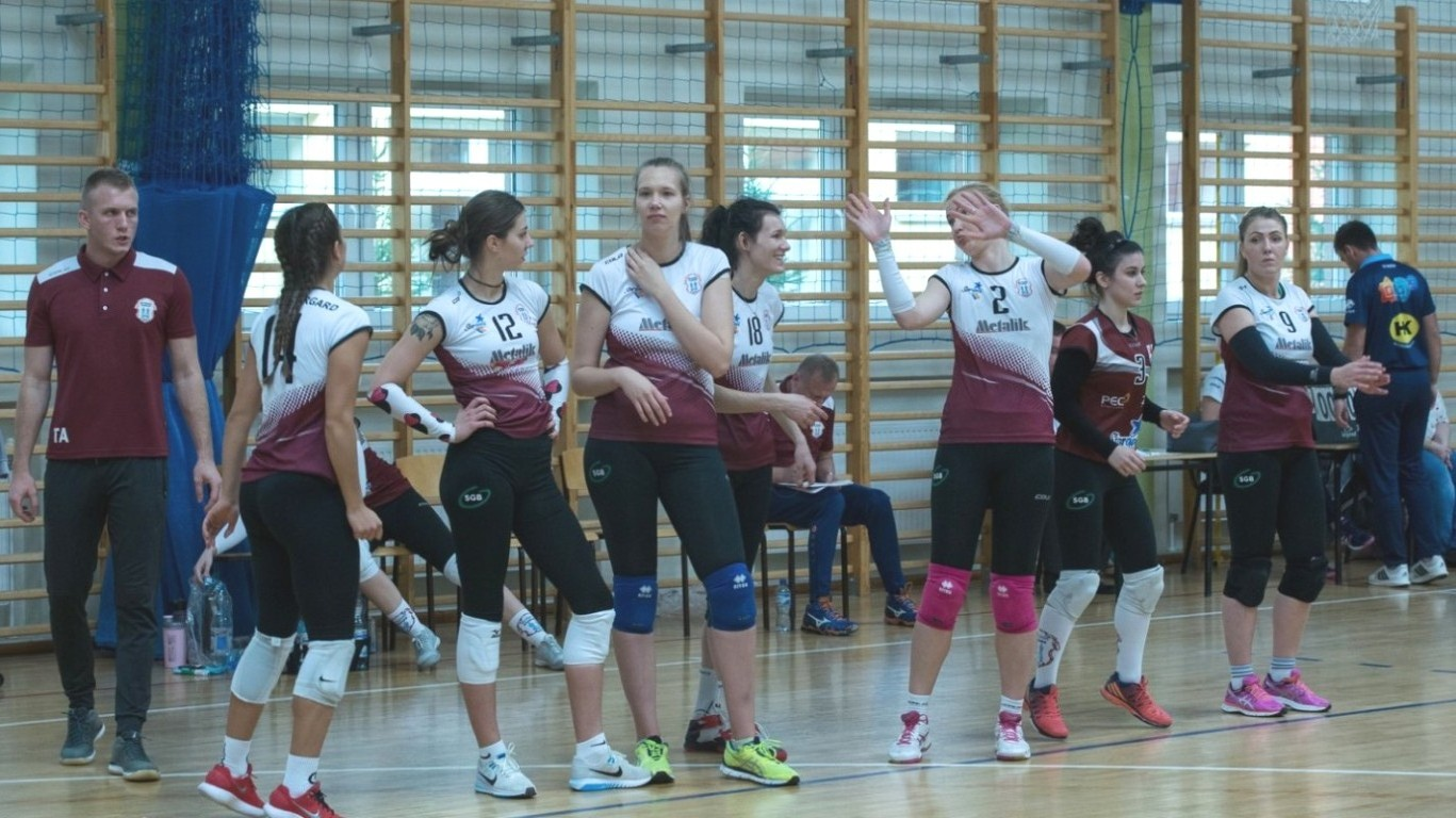 Spónia Stargard - Gedania Gdańsk (02.11.2018)